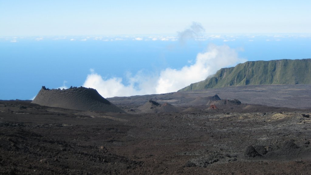 Foto del volcán reunionés el Piton de la Fournaise.